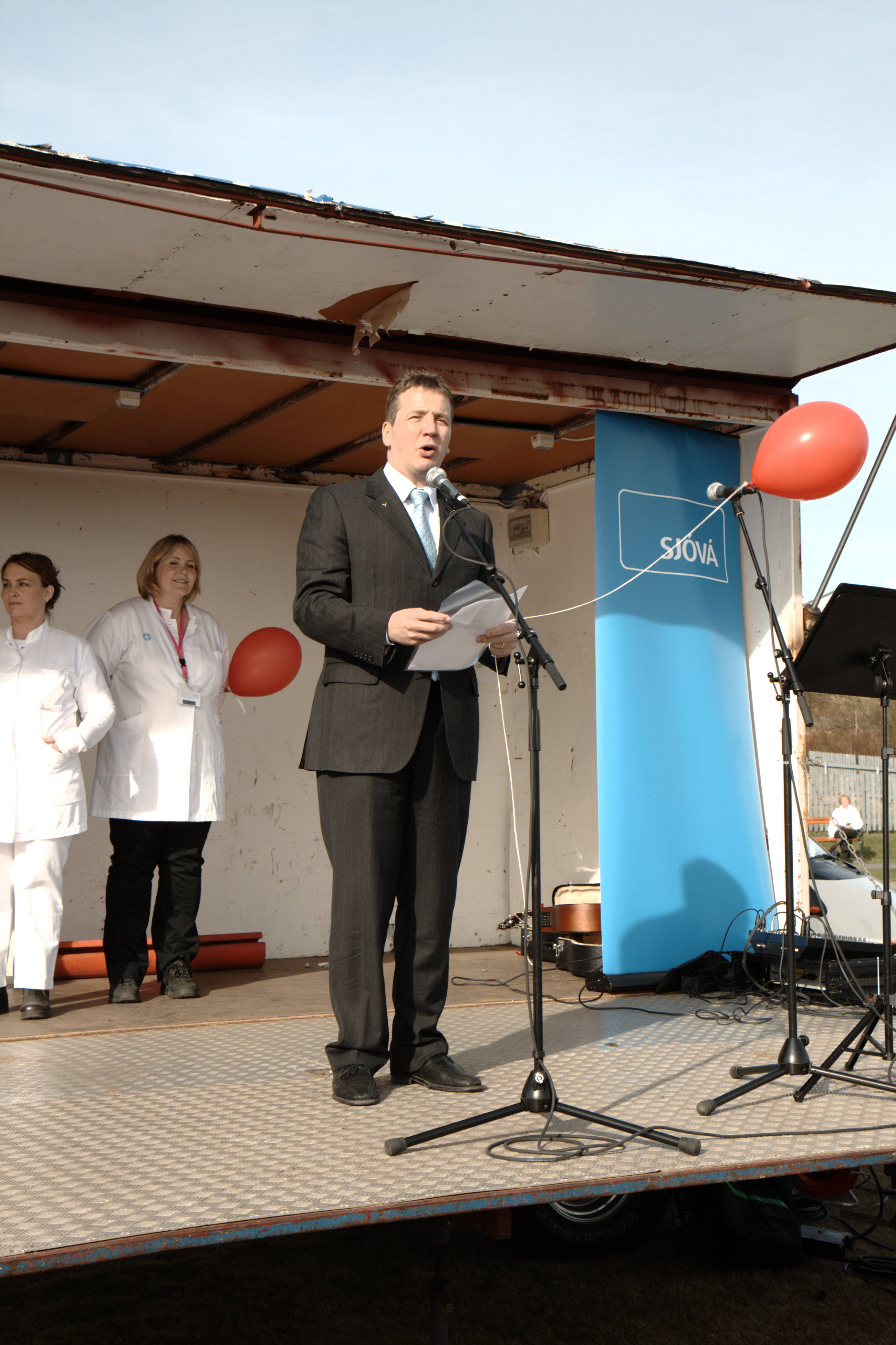 Guðlaugur Þór Þórðarson 2008 bei einer Rede.